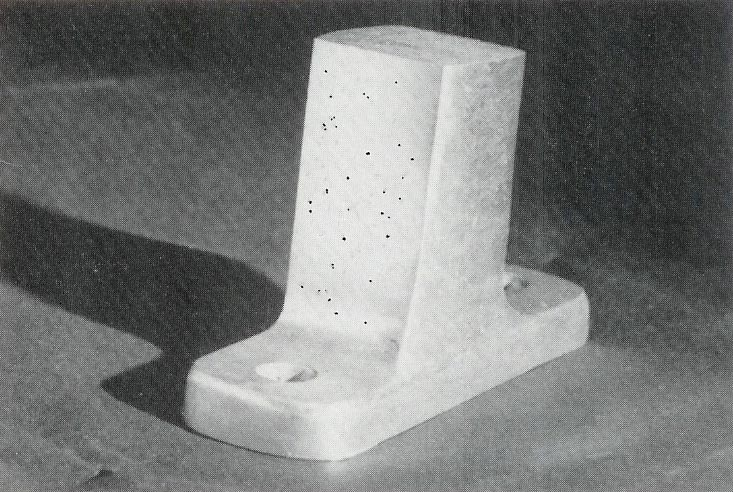 Gasporosität an bearbeiteter Oberfläche